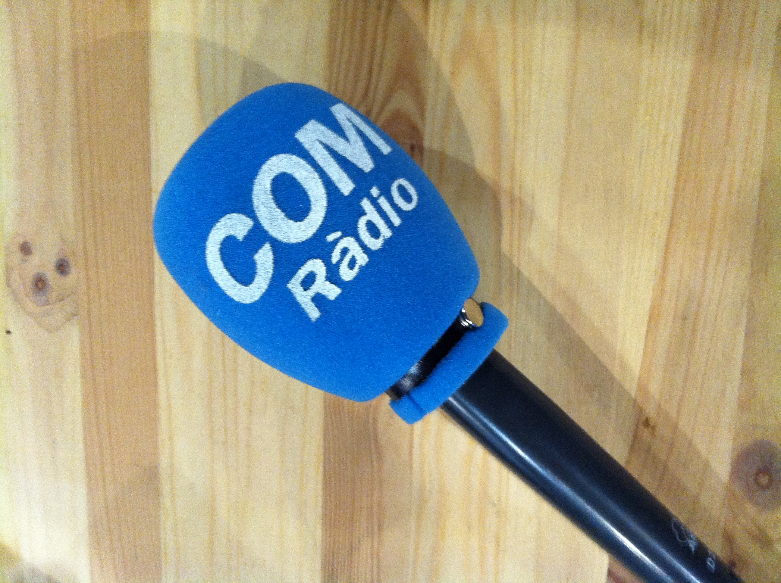 COM Radio Mic